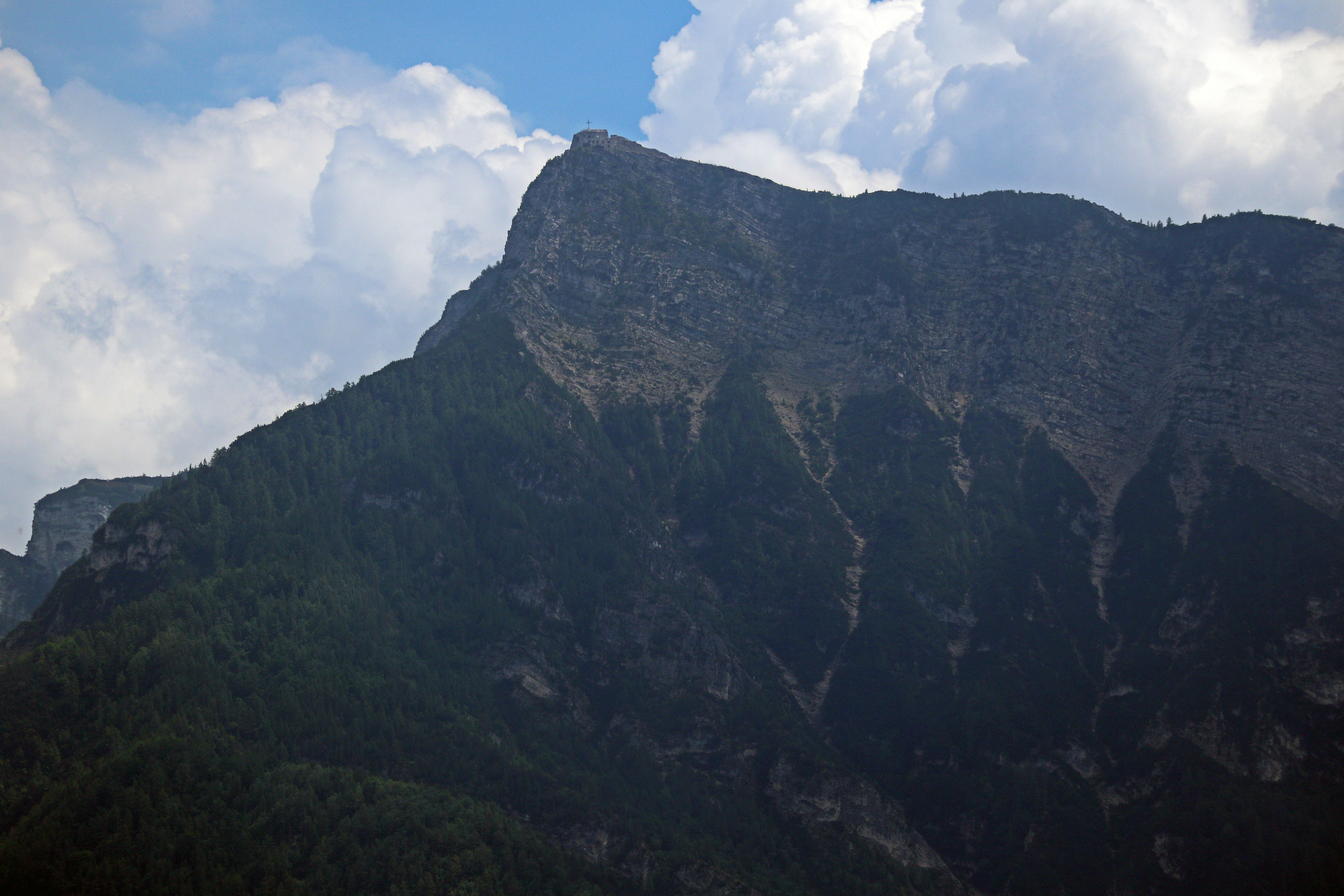 Pizzo di Levico (Cima Vezzena) aus der Valsugana. Aufnahmestandpunkt ist das ehemalige Werk Tenna.